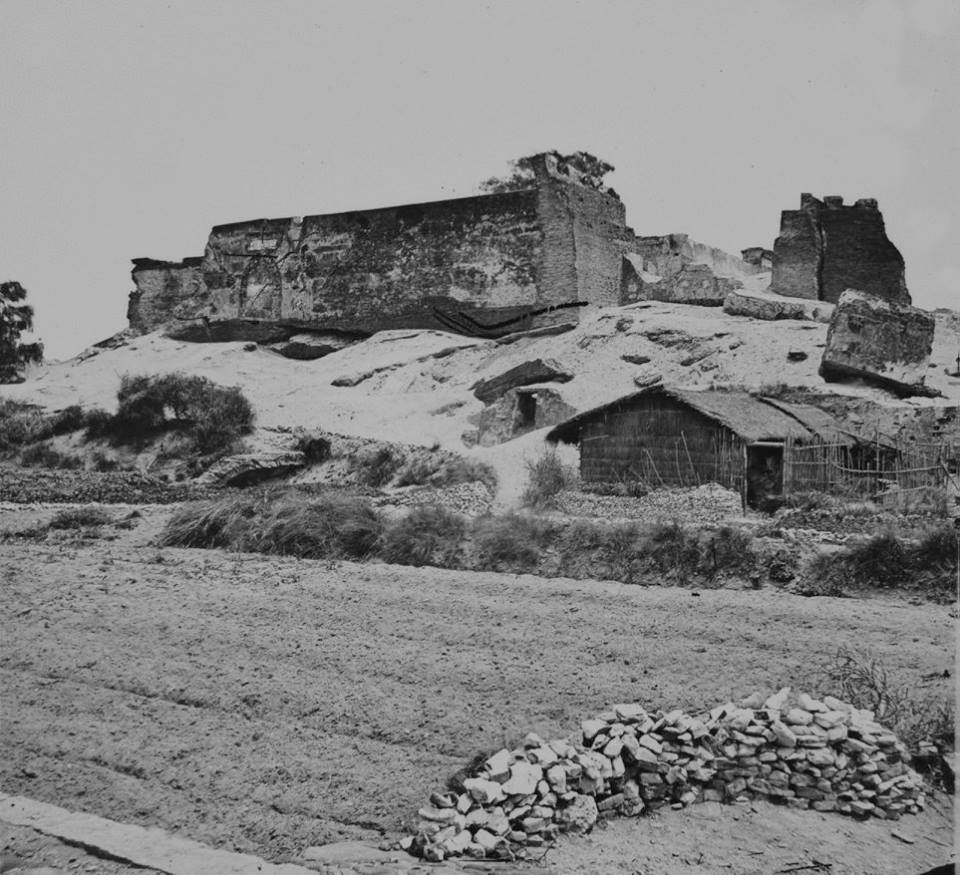 1871年熱蘭遮城舊照